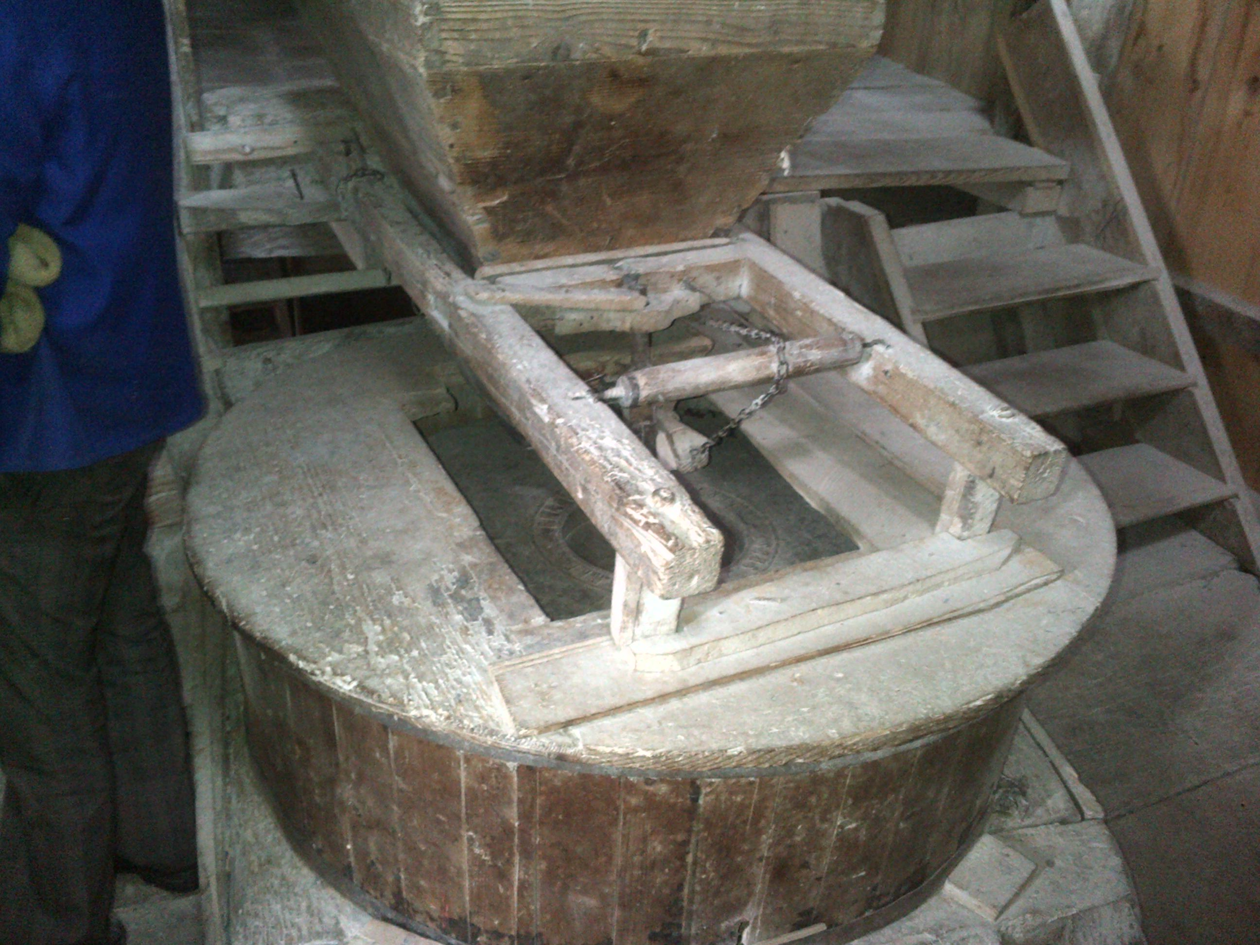 Ohaba - Moara functionala